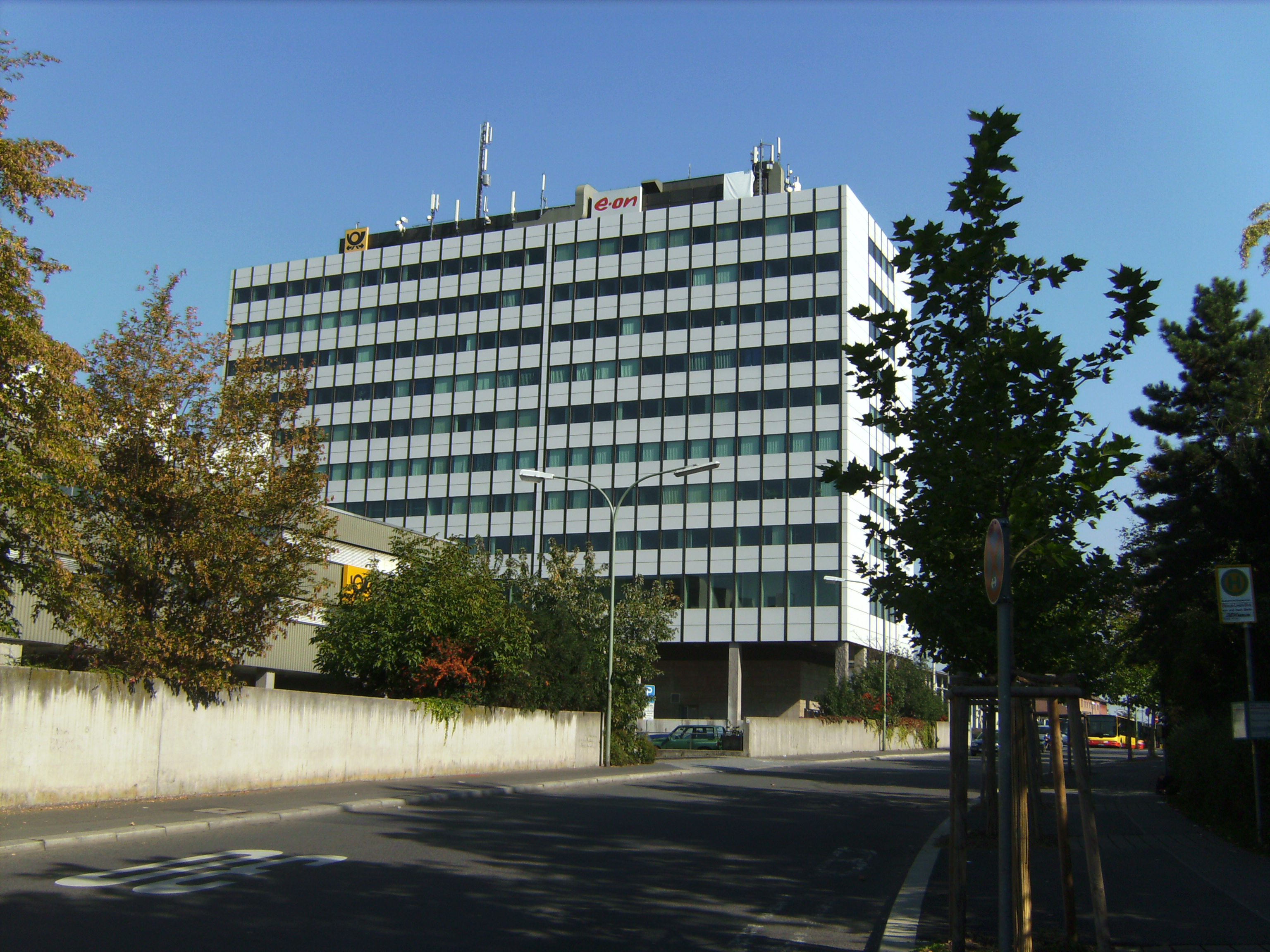 Die Hauptstelle der Deutschen Post in Würzburg (Posthochhaus)